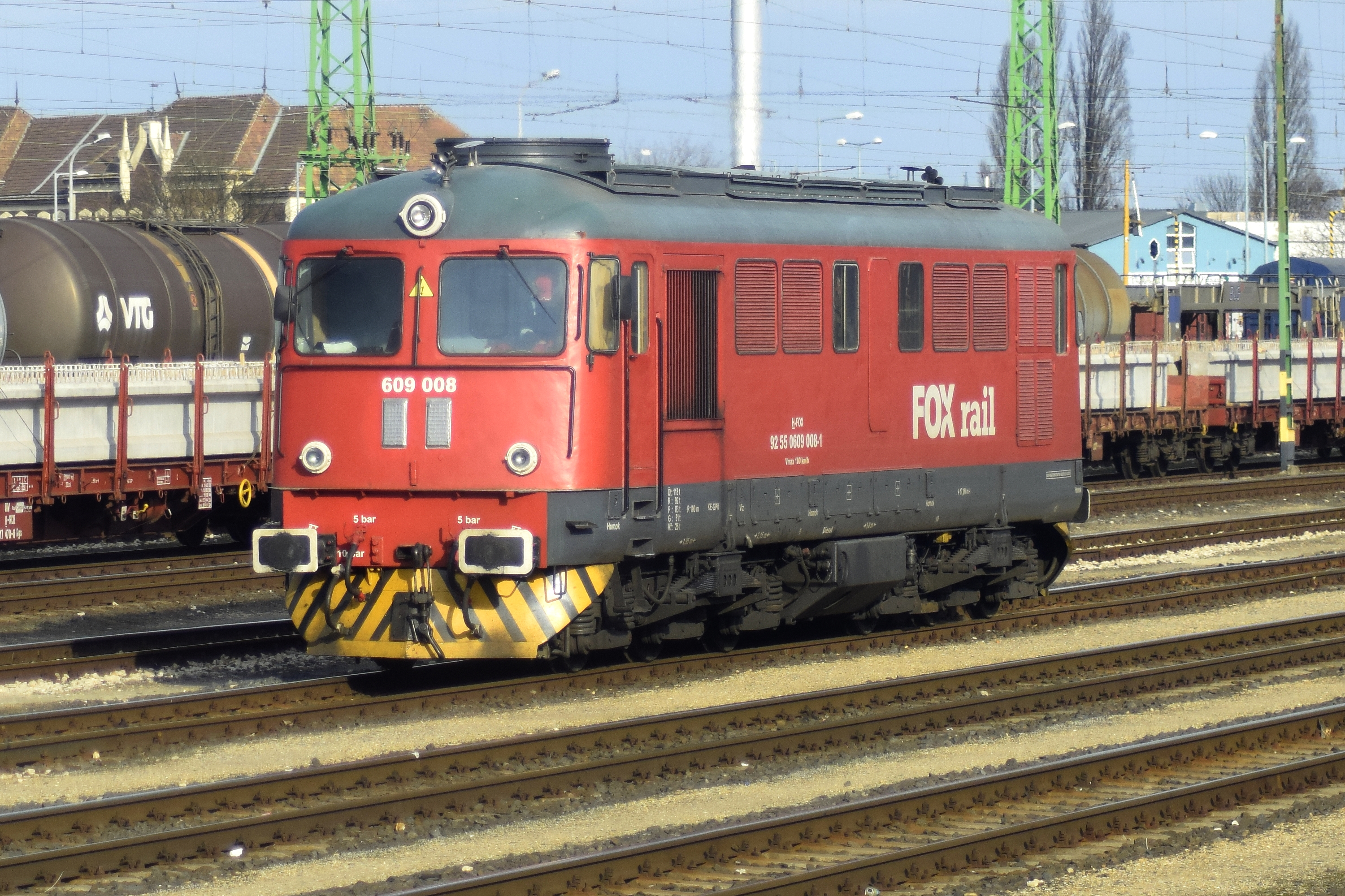 A Foxrail 609 008 pályaszámú Sulzer mozdonya Győr-Rendezőben.